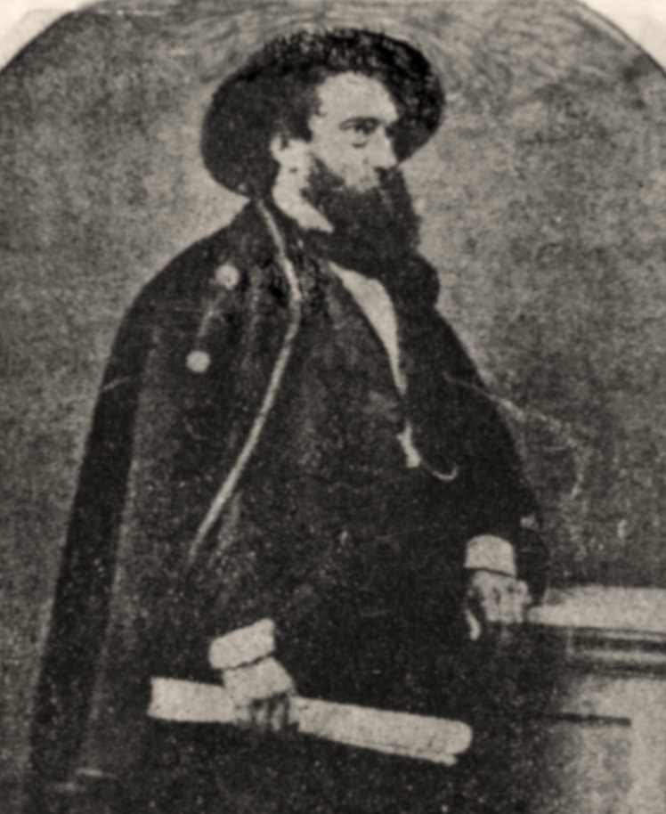 Raffaello_Carboni